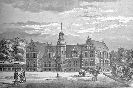 Herregaarden Klintholm paa Møen. Den nuværende Hovedbygningen er opført 1873-75 i Renaissancestil. Tilhører Kmhr. C. S. Scavenius.